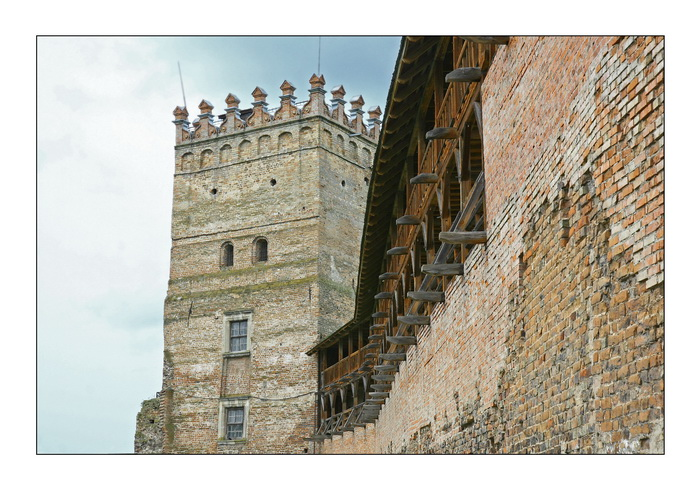 Луцкий Замок